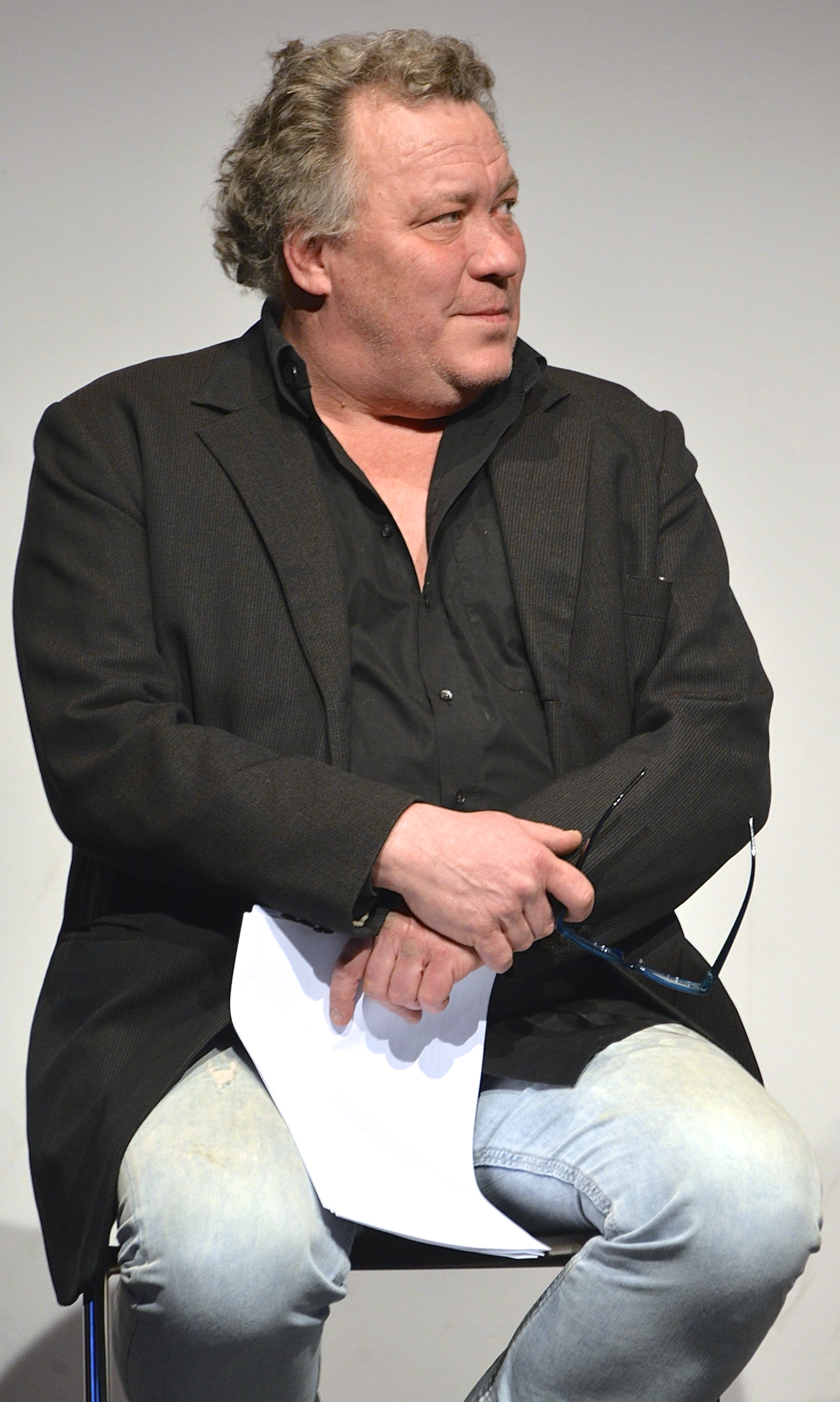 Leif Andrée i ett framträdande i Kulturhuset på Strindbergsårets sista dag den 20 januari 2013.